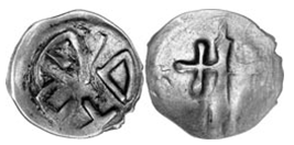 Дынарый Вітаўт(?) з надпісам "ПЕЧАТ"